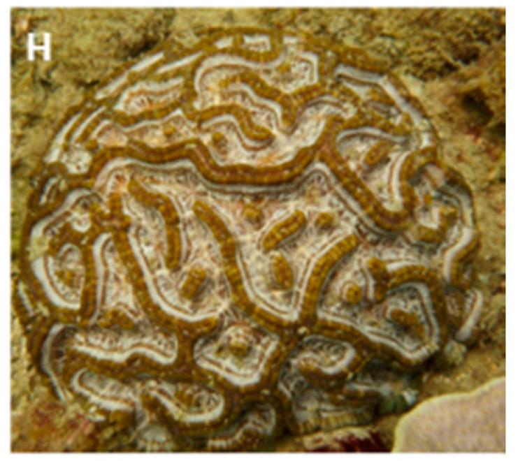 Symphyllia wilsonii en Minden Reef